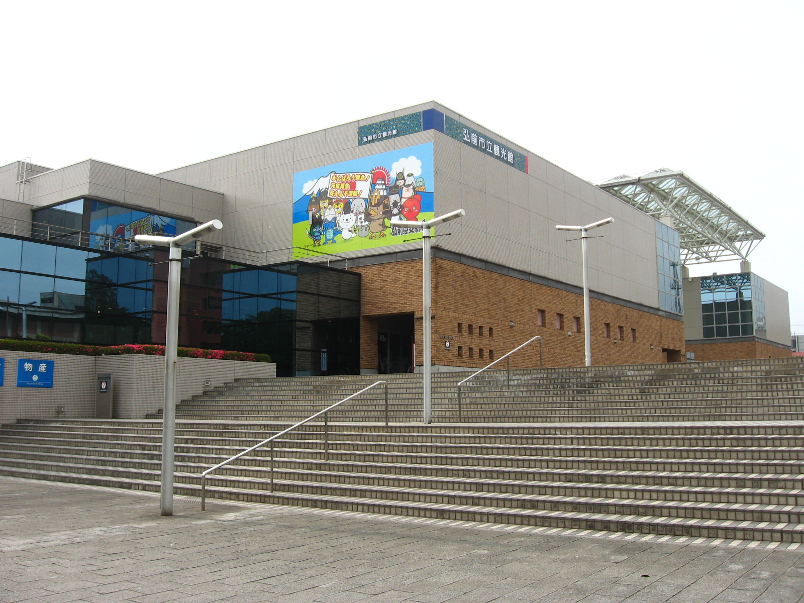 弘前市立観光館（青森県弘前市）